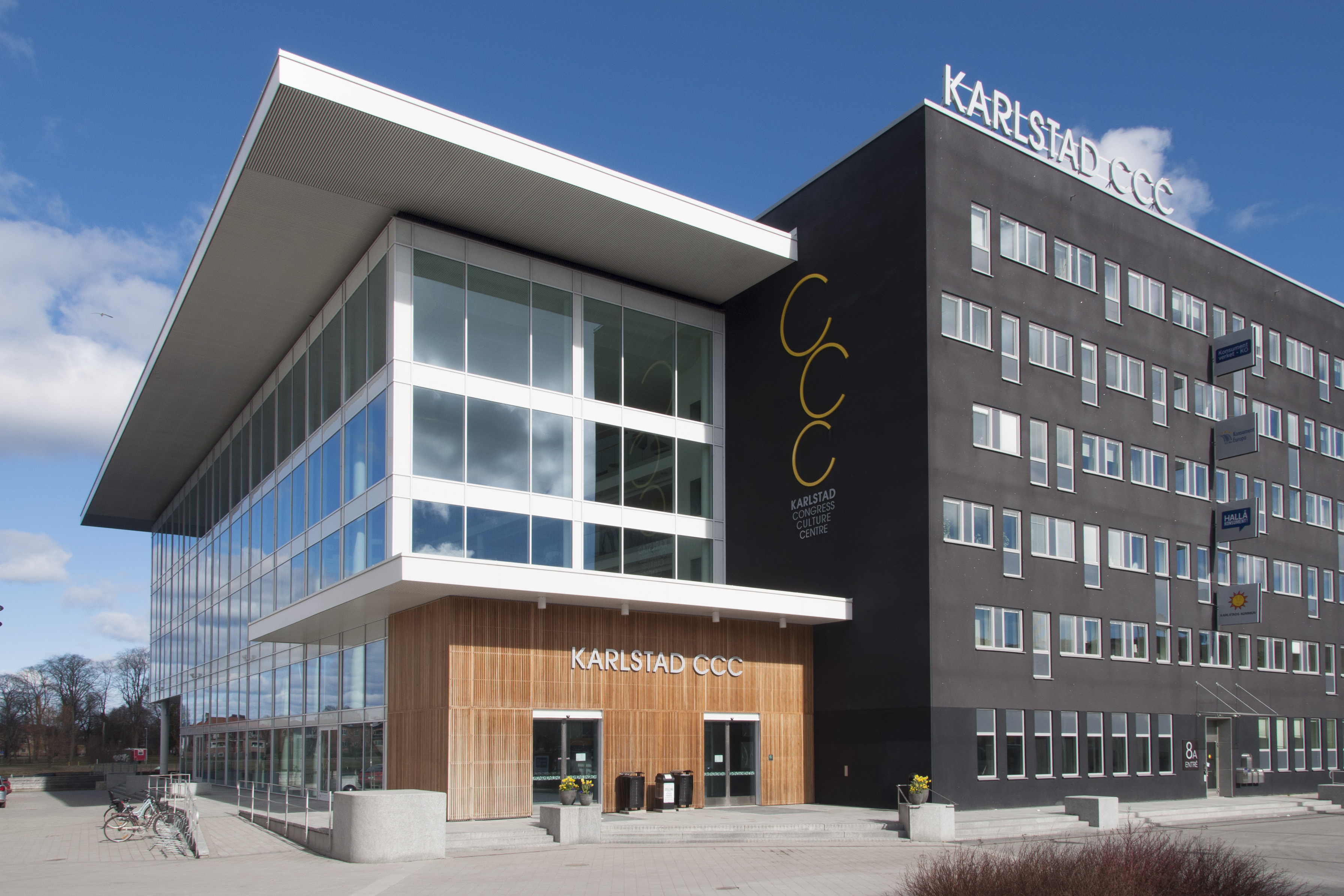 Karlstad CCC, Byggnadsår 2011. Arkitekt: Ulf Bergfjord